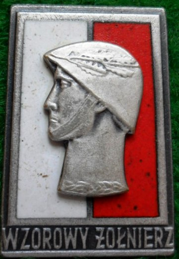 Wzorowy Żołnierz - srebrna